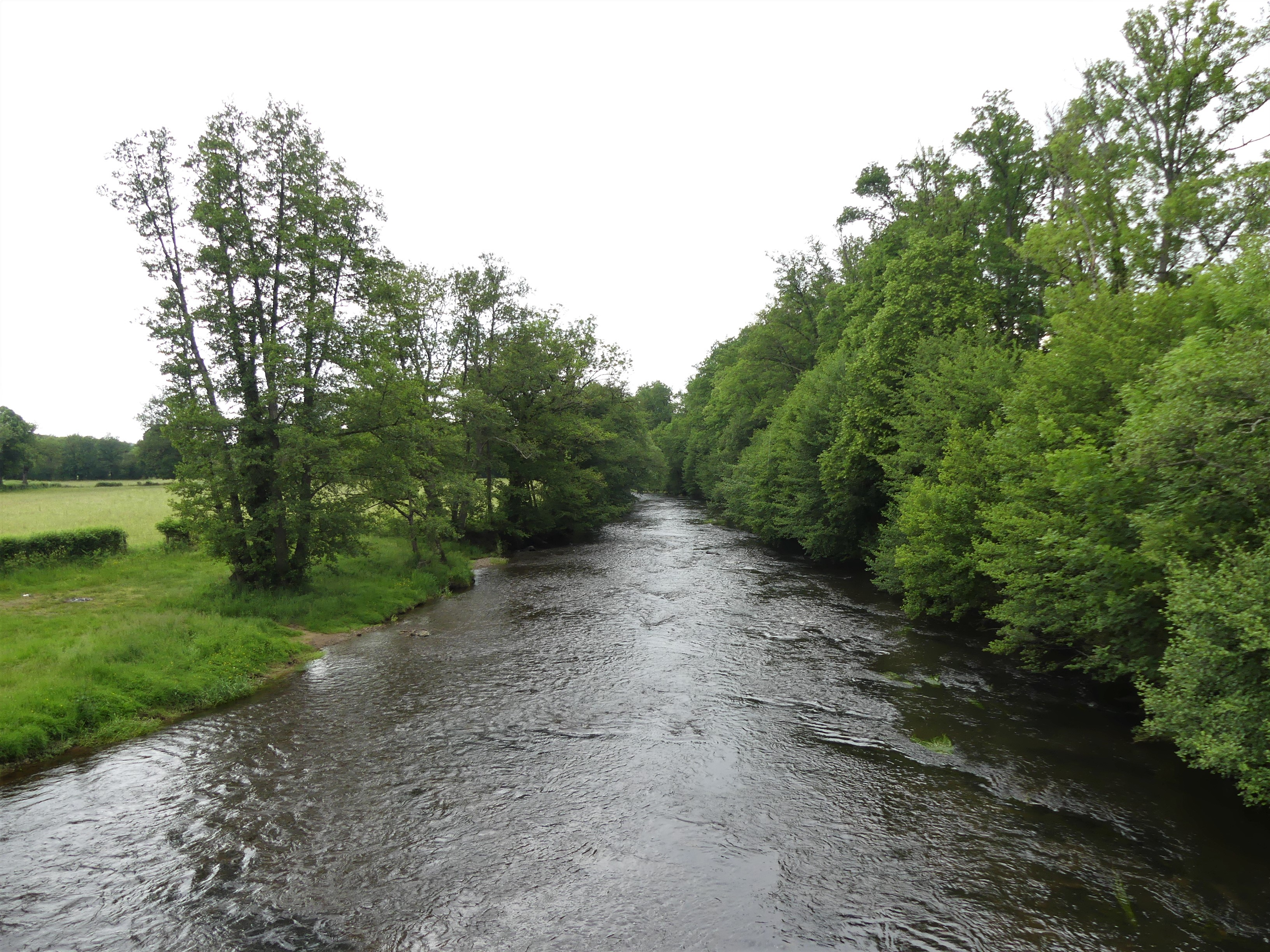 La Creuse au pont de la route départementale 18A2 aux Chambons Hauts, Saint-Martial-le-Mont, Creuse, France. Vue pris en direction de l'aval.